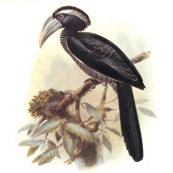 Tockus hartlaubi